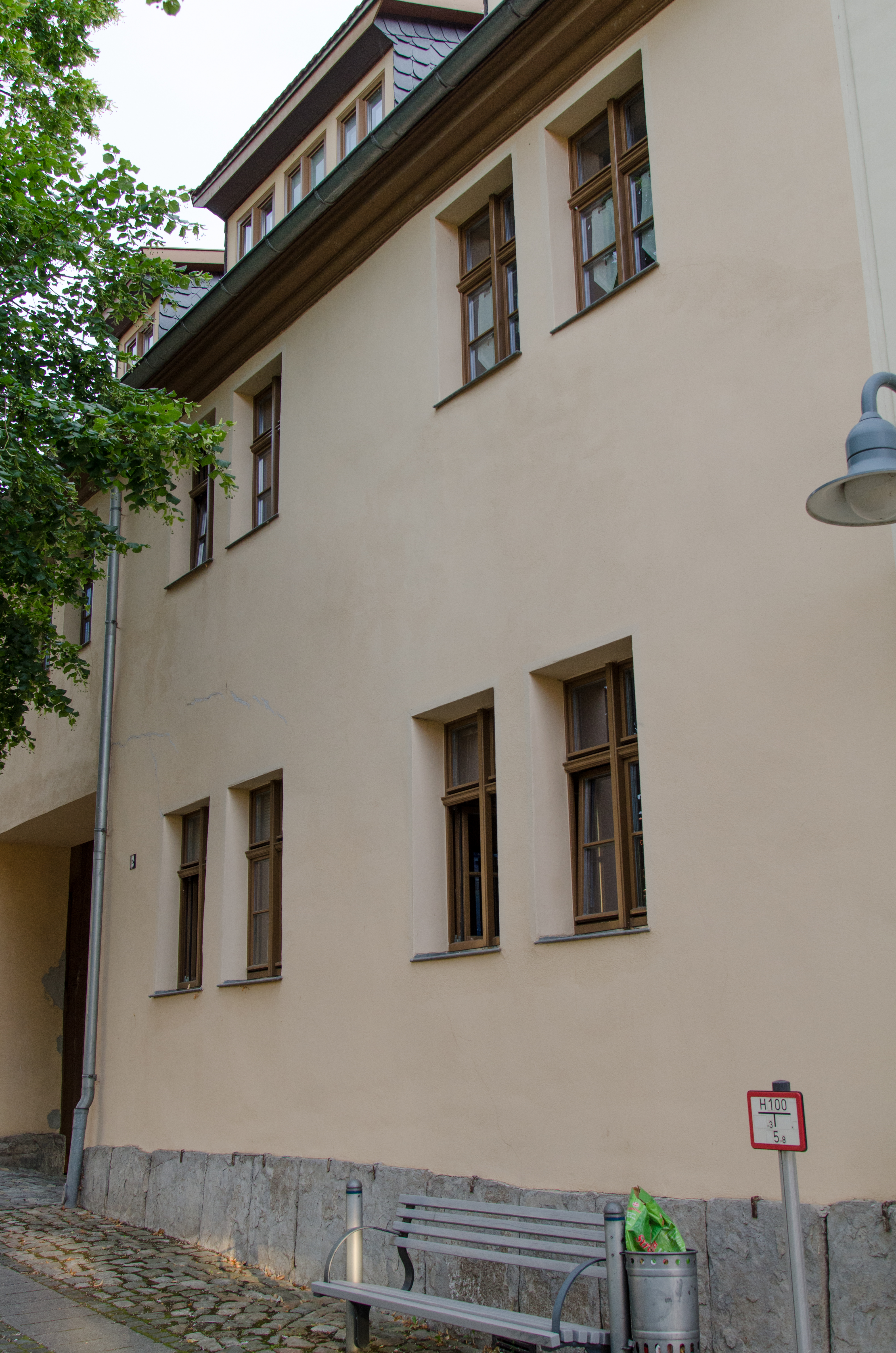 Sangerhausen, Alter Markt 2